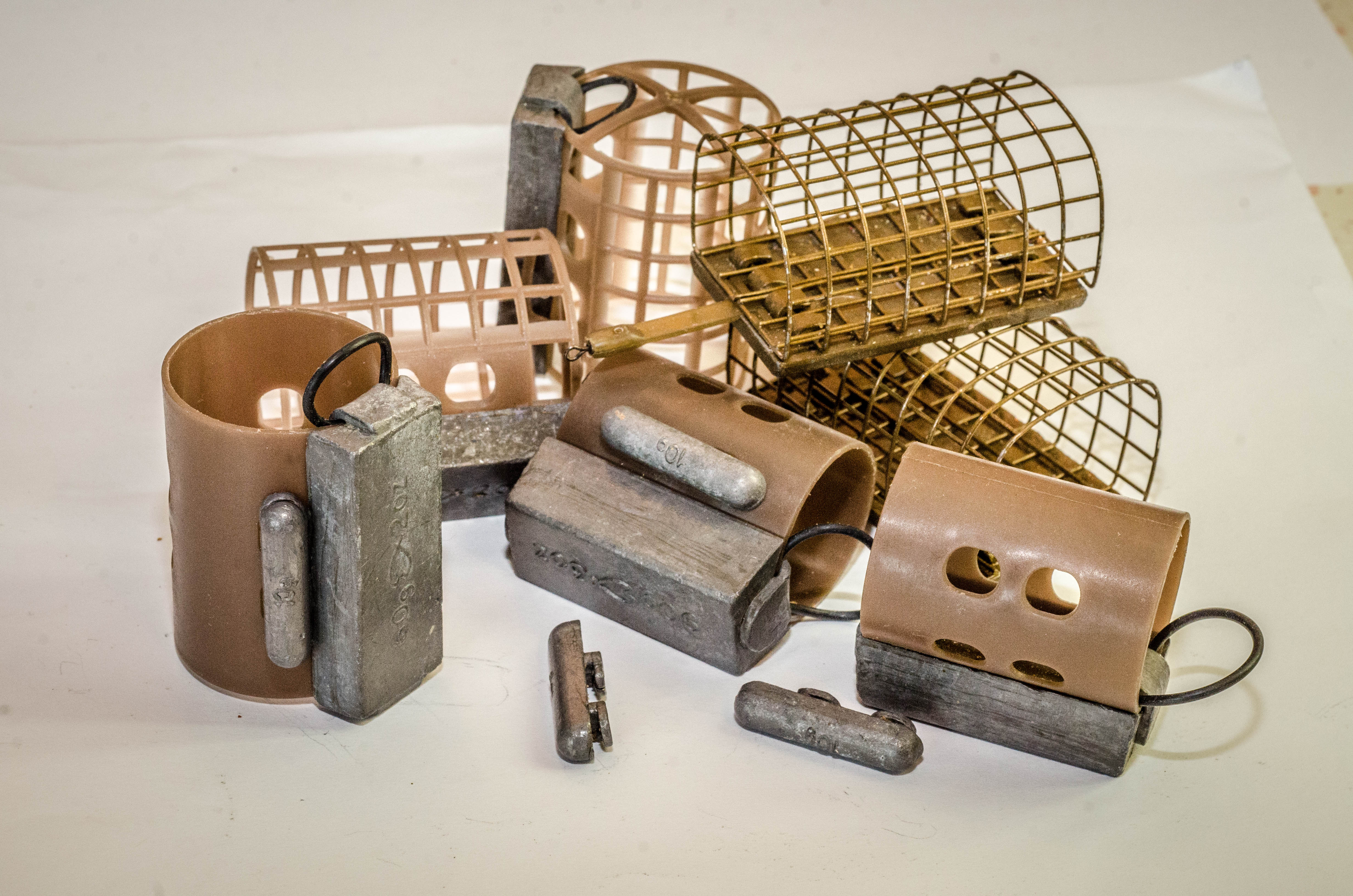 Cosulete momitoare folosite in pescuitul la feeder